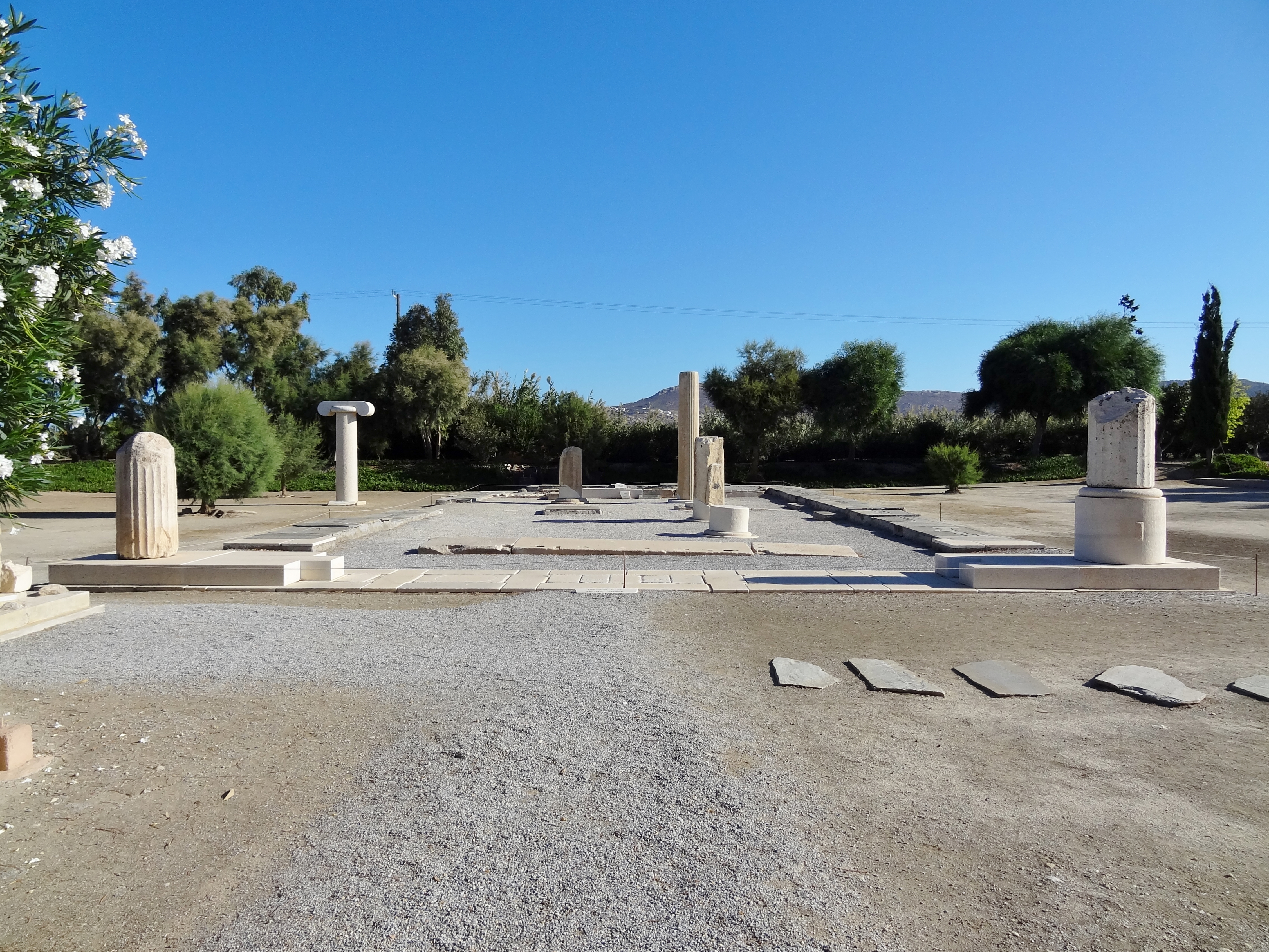 Tempel des Dionysos von Yria auf Naxos, Kykladen, Griechenland